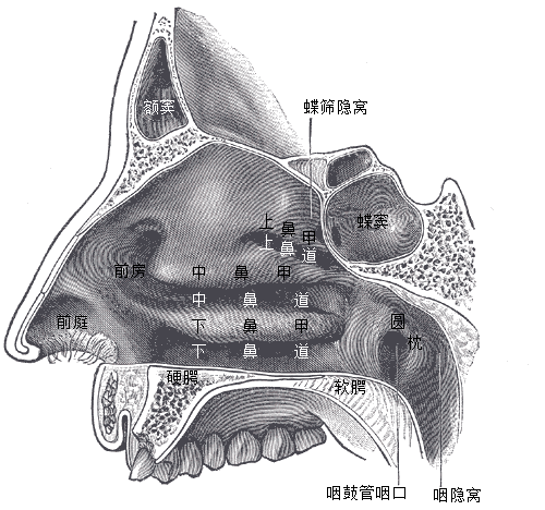 鼻腔侧壁。